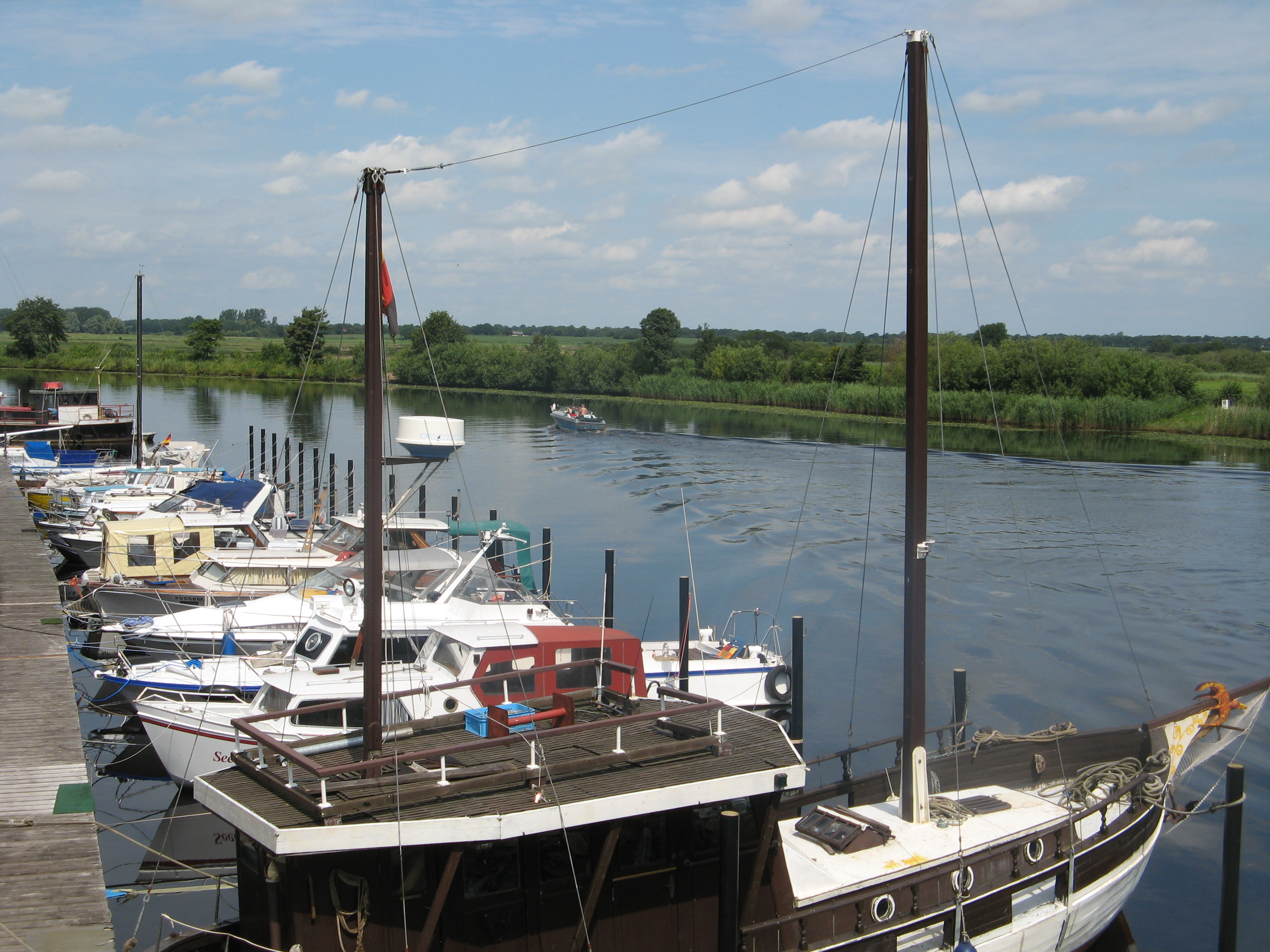 Pahlen